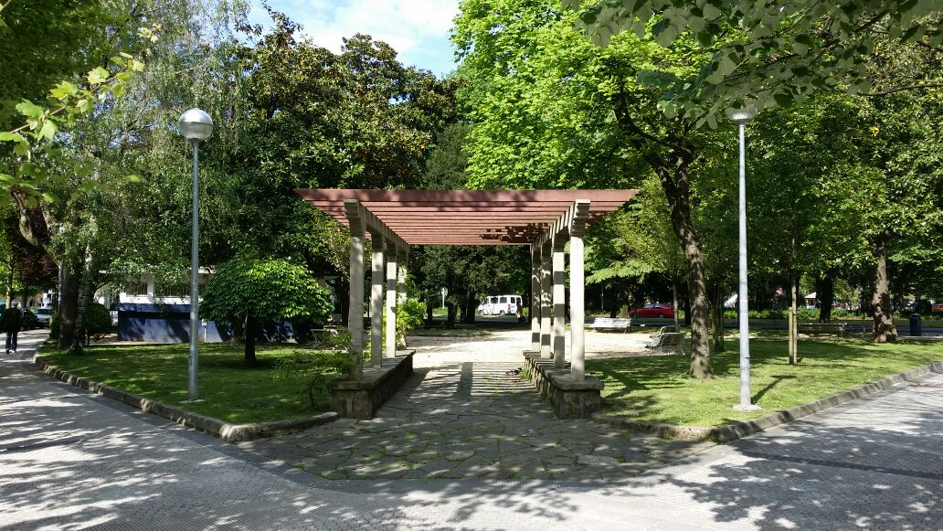 Mentxu Gal lorategiak. Amarapediaren gunea